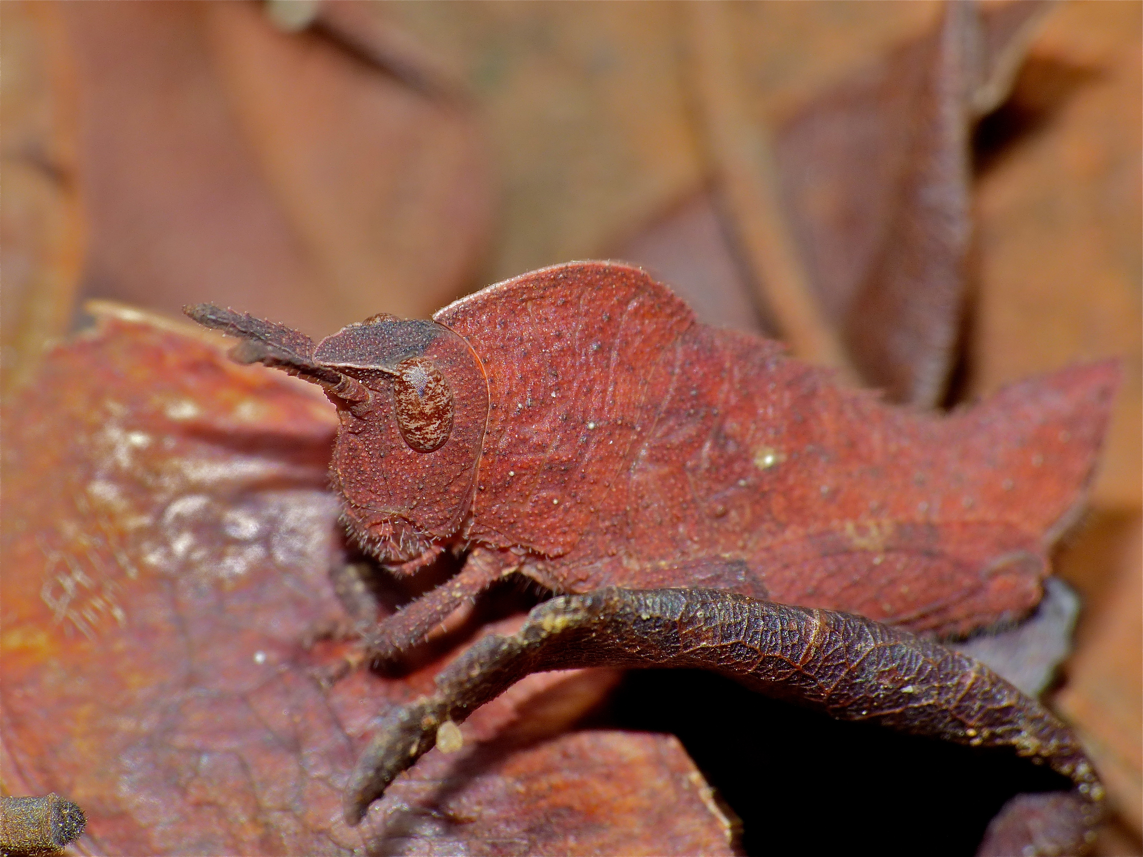 Punda Maria Camp, Kruger NP, SOUTH AFRICA